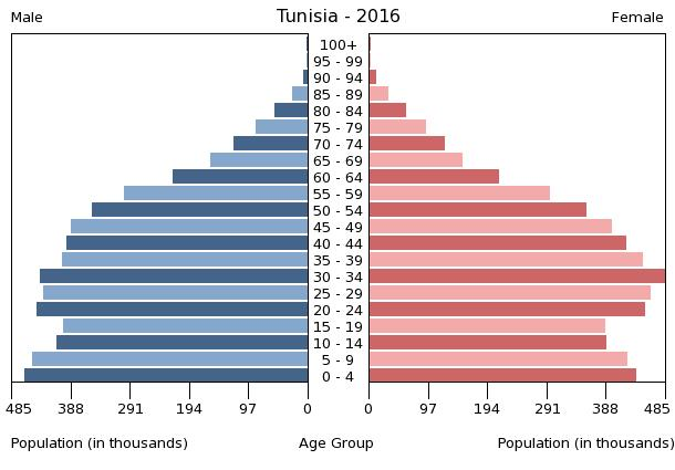 A population pyramid illustrates the age and sex structure of a country's population and may provide insights about political and social stability, as well as economic development. The population is distributed along the horizontal axis, with males shown on the left and females on the right. The male and female populations are broken down into 5-year age groups represented as horizontal bars along the vertical axis, with the youngest age groups at the bottom and the oldest at the top. The shape of the population pyramid gradually evolves over time based on fertility, mortality, and international migration trends.